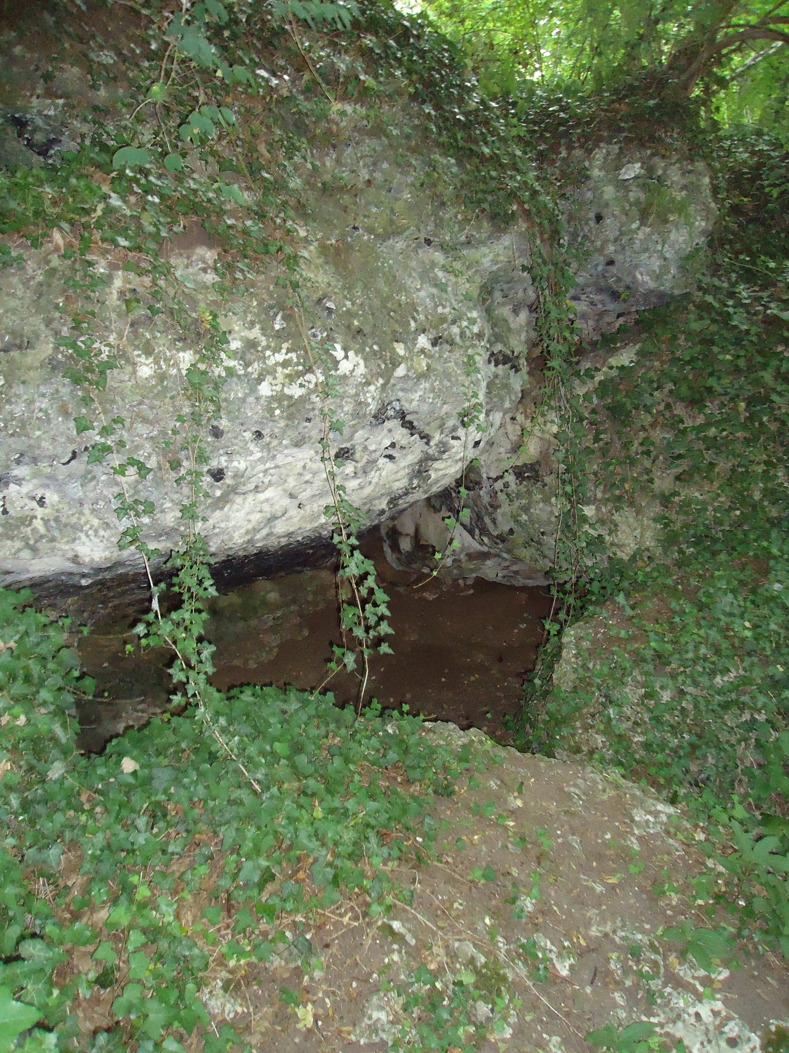 Abris sous roche dits Abris du Mammouth - Saint-Pierre-d'Autils - Eure (27)